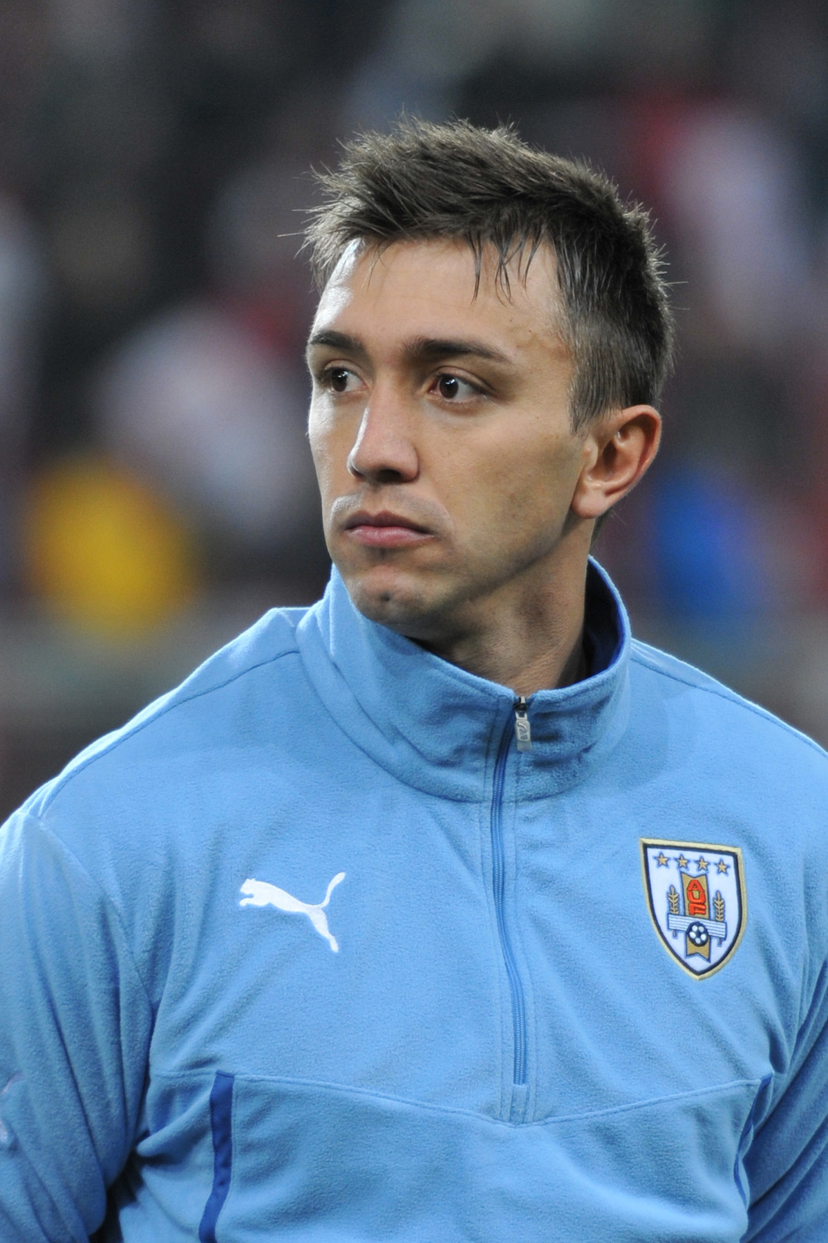 Freundschaftliches Länderspiel Österreich - Uruguay am 5. März 2014 in Klagenfurt: Fernando Muslera